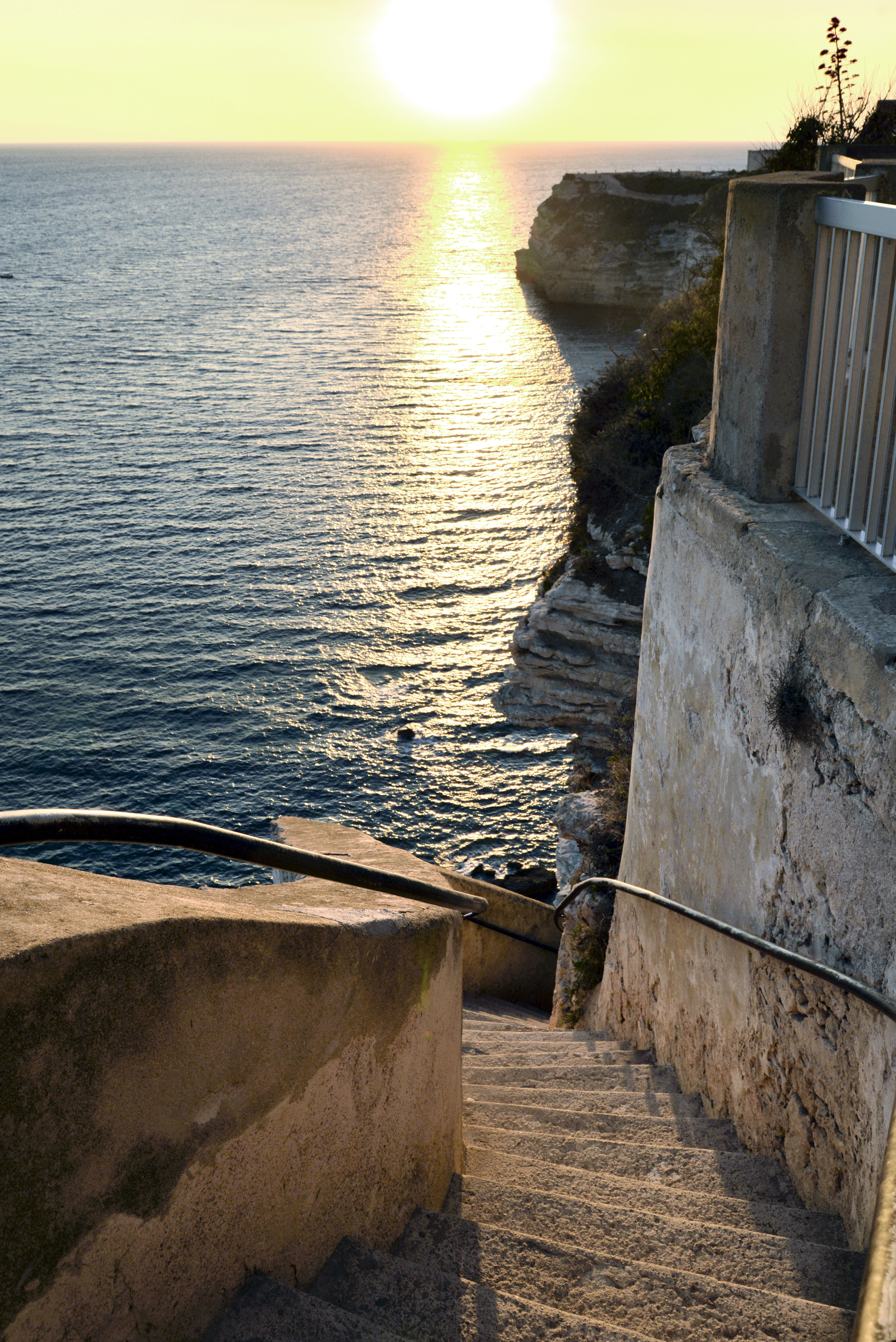 Bonifacio (Corse-du-Sud) - Les premières marches des 189 que compte l'escalier du Roi d'Aragon, pour gagner la source d'eau potable qui se trouve au bord de mer. Cet escalier, réalisé par les moines franciscains dans les années 1420, est inscrit au titre des Monuments historiques.